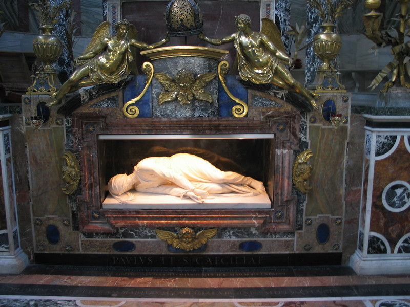 Le tombeau de Sainte-Cécile à Rome dans la Basilica di Santa Cecilia in Trastevere L'inscription en latin devant le tombeau mentionne : "Ci-gît la dépouille de la très sainte vierge Cécile, que j'ai vu de mes yeux reposer intacte dans sa tombe. J'ai représenté pour vous dans ce marbre la sainte dans l'attitude exacte telle qu'elle m'est apparue". été 2006 Nicolas Guilmain